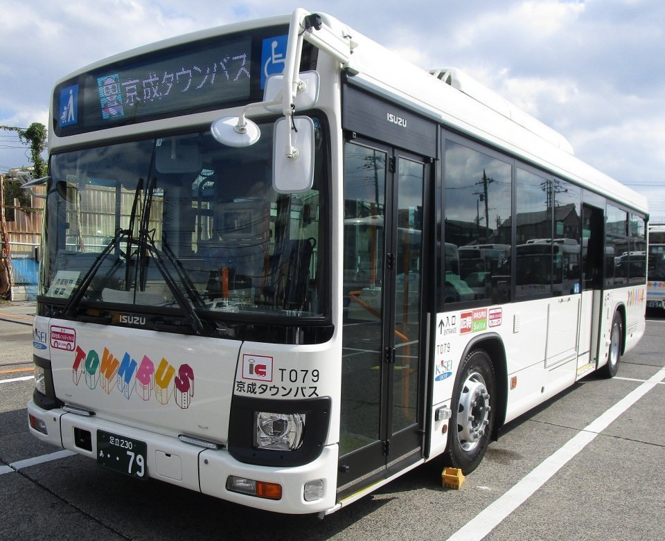 京成タウンバス エルガ